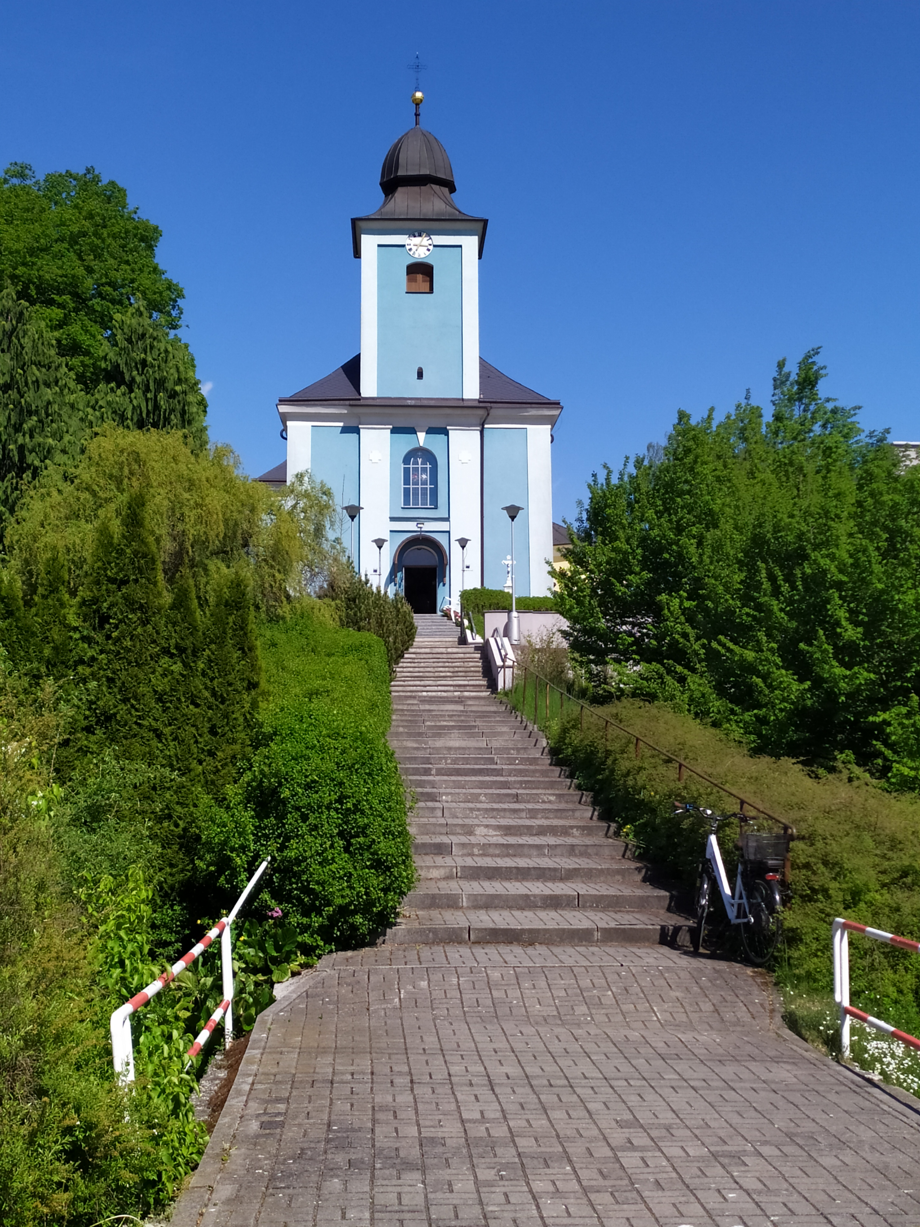 Kostel ve Větřkovicích u Opavy